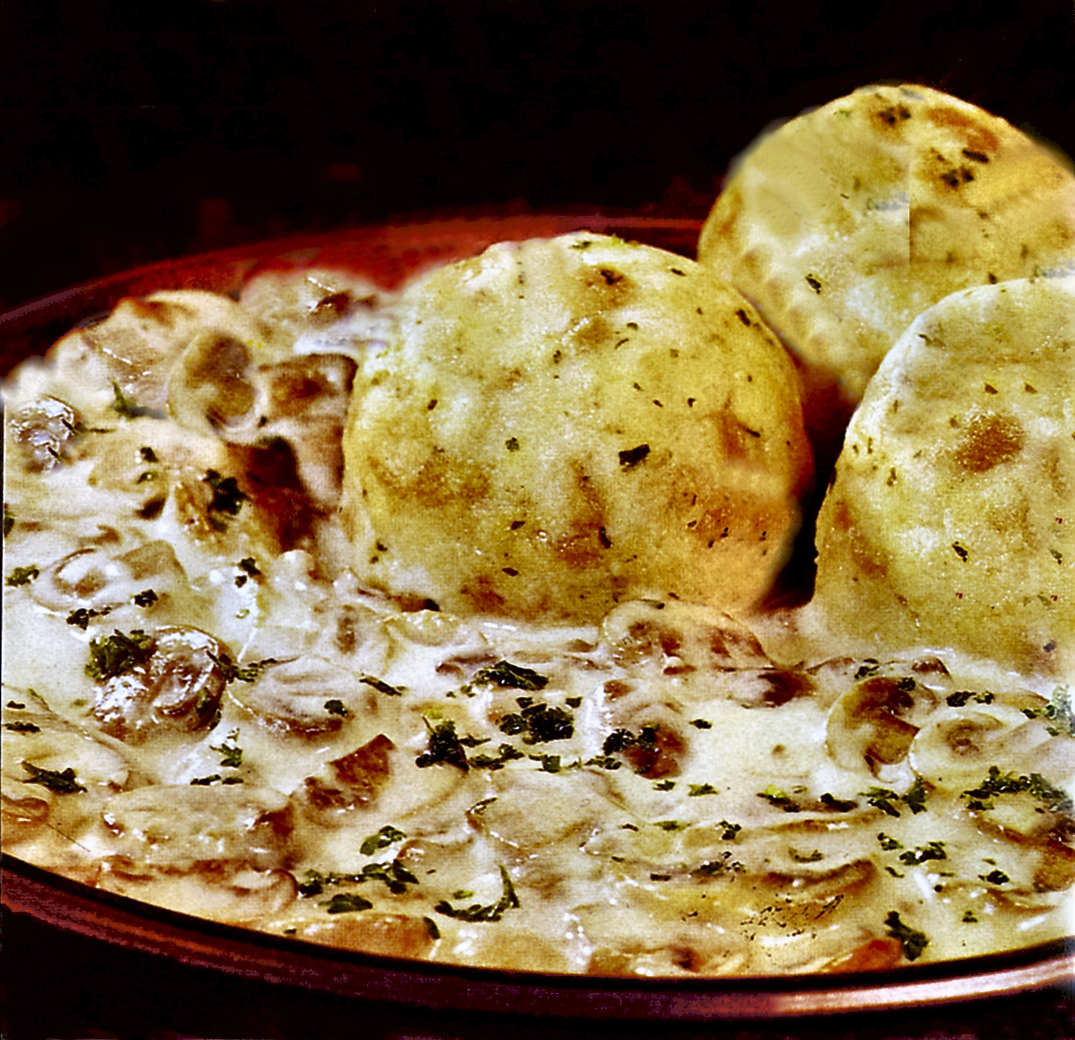 Ciulama cu soiul Boletus (edulis, erythropus, luridus, pinicola ș.a.) cu găluște de chifle